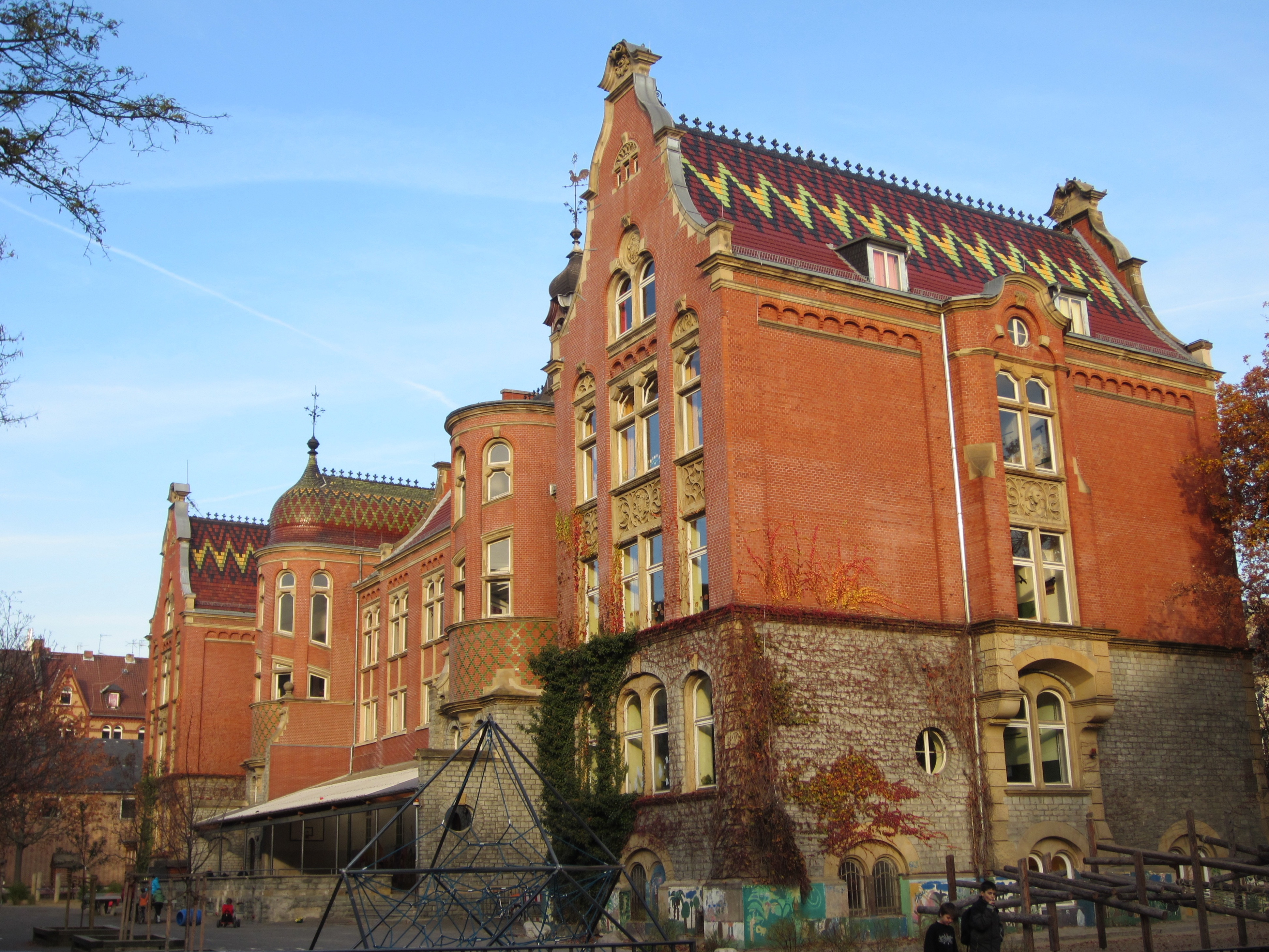 Rückseite der Blücherschule. Westend, Wiesbaden, Germany